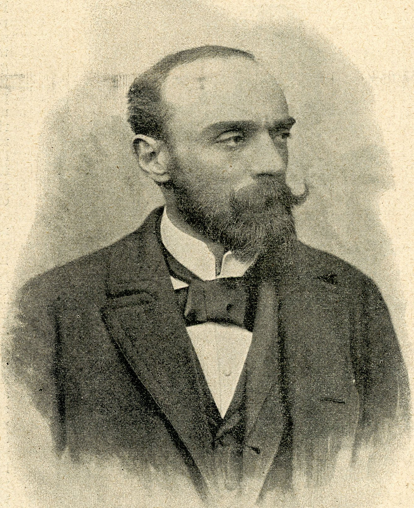 Riccardo Selvatico, promotore e presidente dell’Esposizione di Venezia.